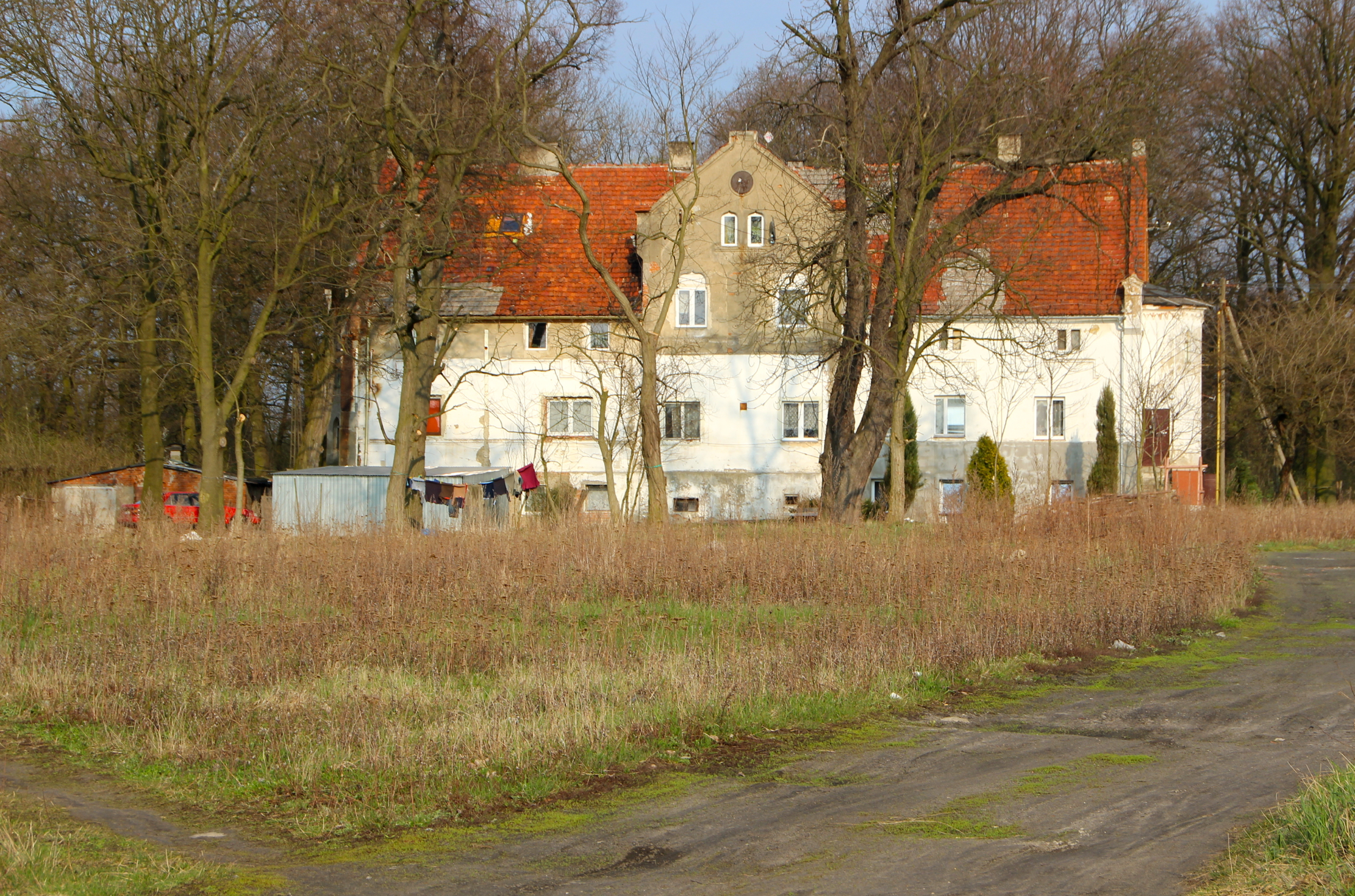 Kłębanowice – województwie dolnośląskim, w powiecie polkowickim, w gminie Radwanice.